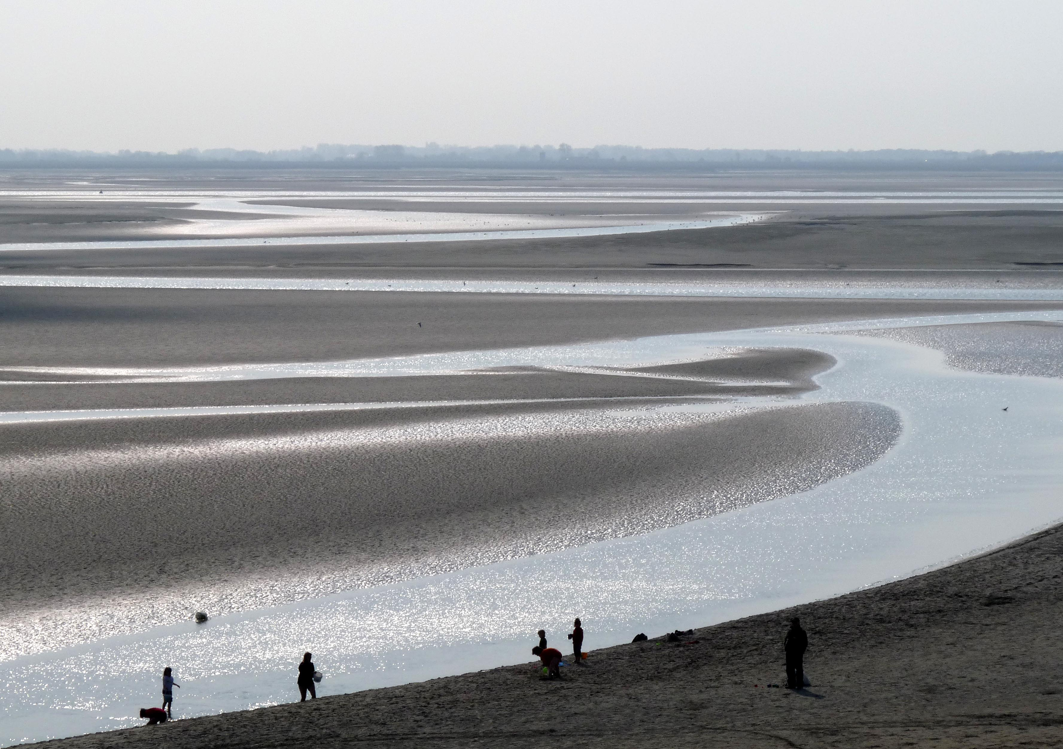 Le Crotoy 04, Baie de la Somme